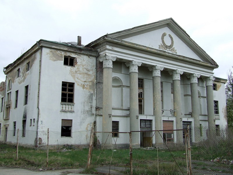 Jonavos baldų kombinato klubas